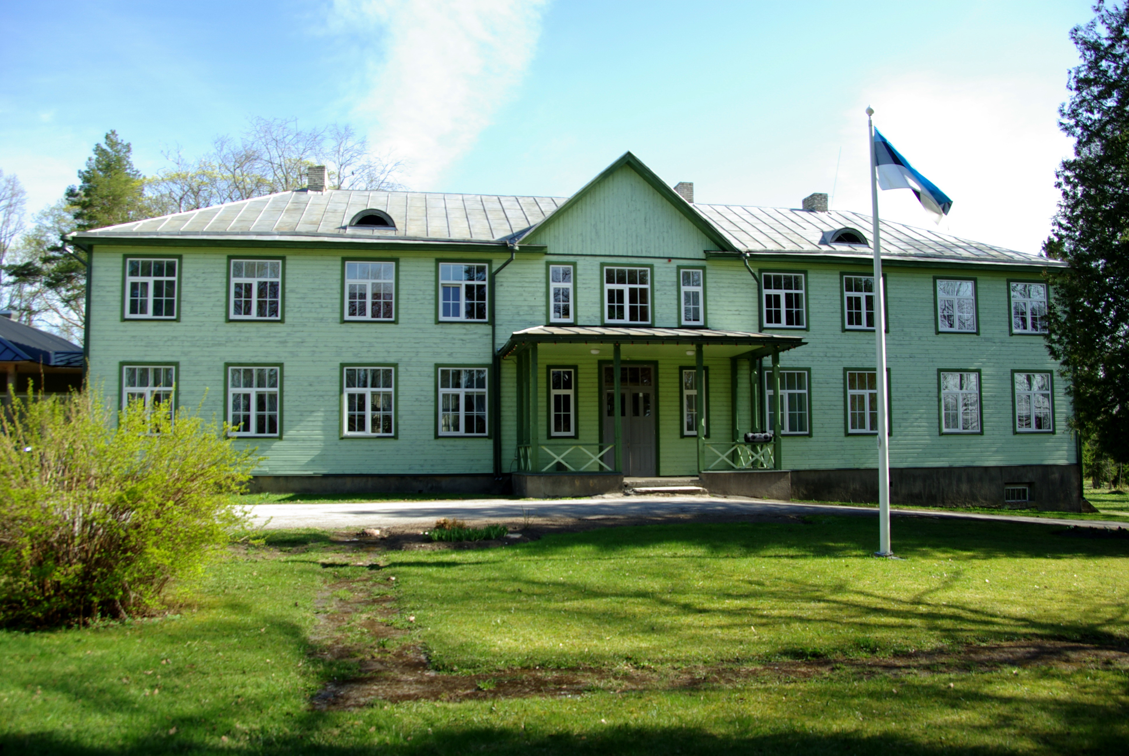 Rapla maakond, Kehtna vald